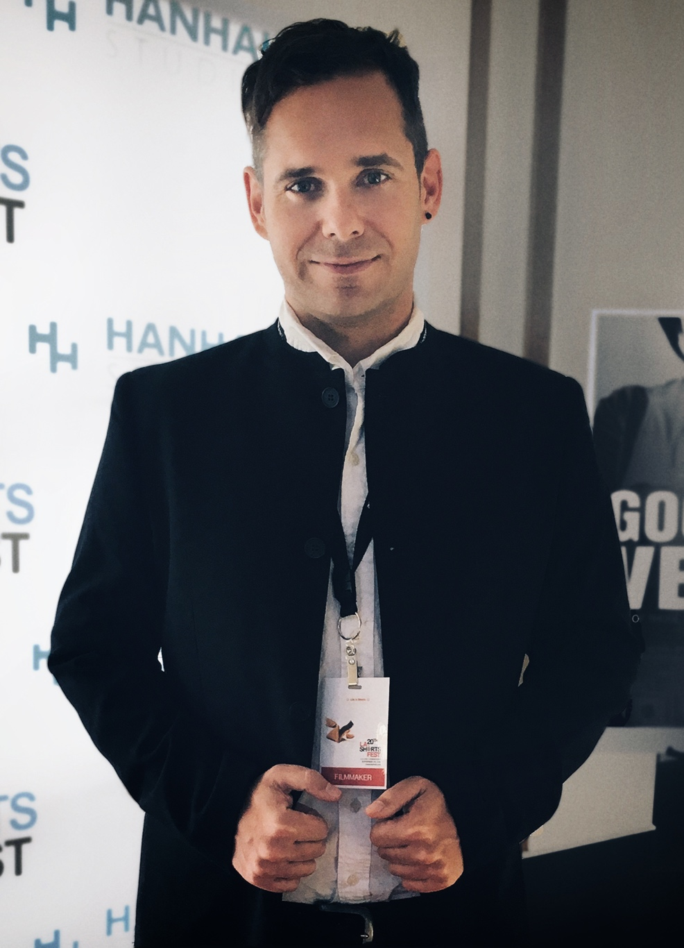 Director